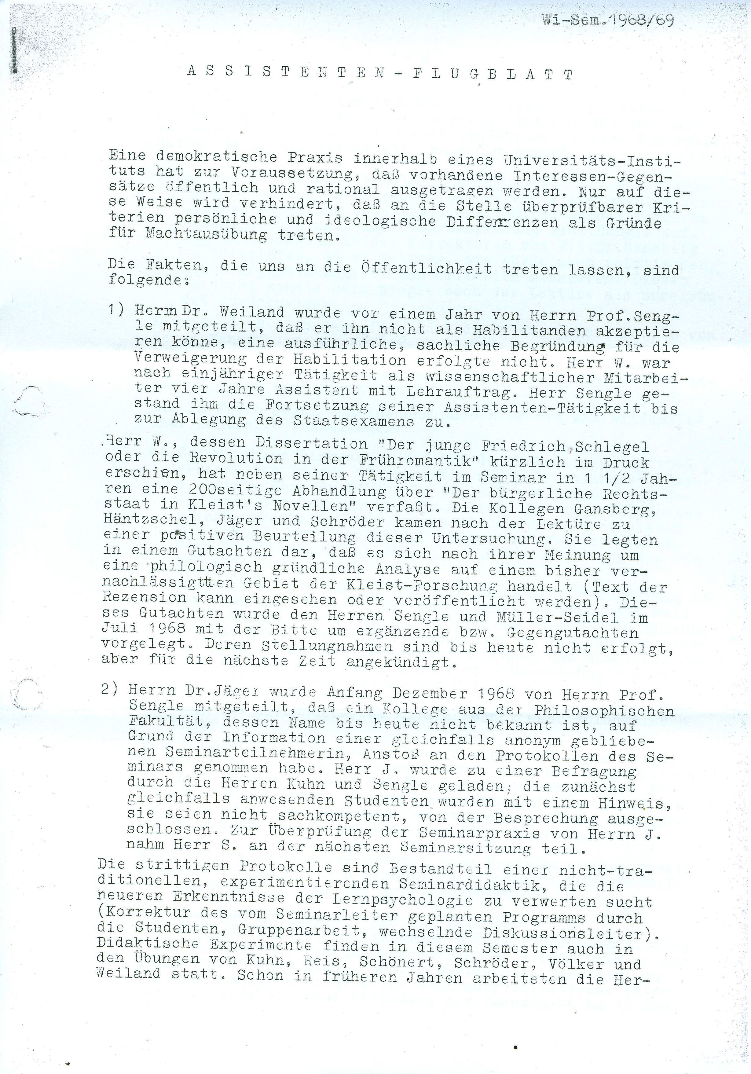 Assistenten-Flugblatt (Blatt 1), Deutsches Seminar, Universität München